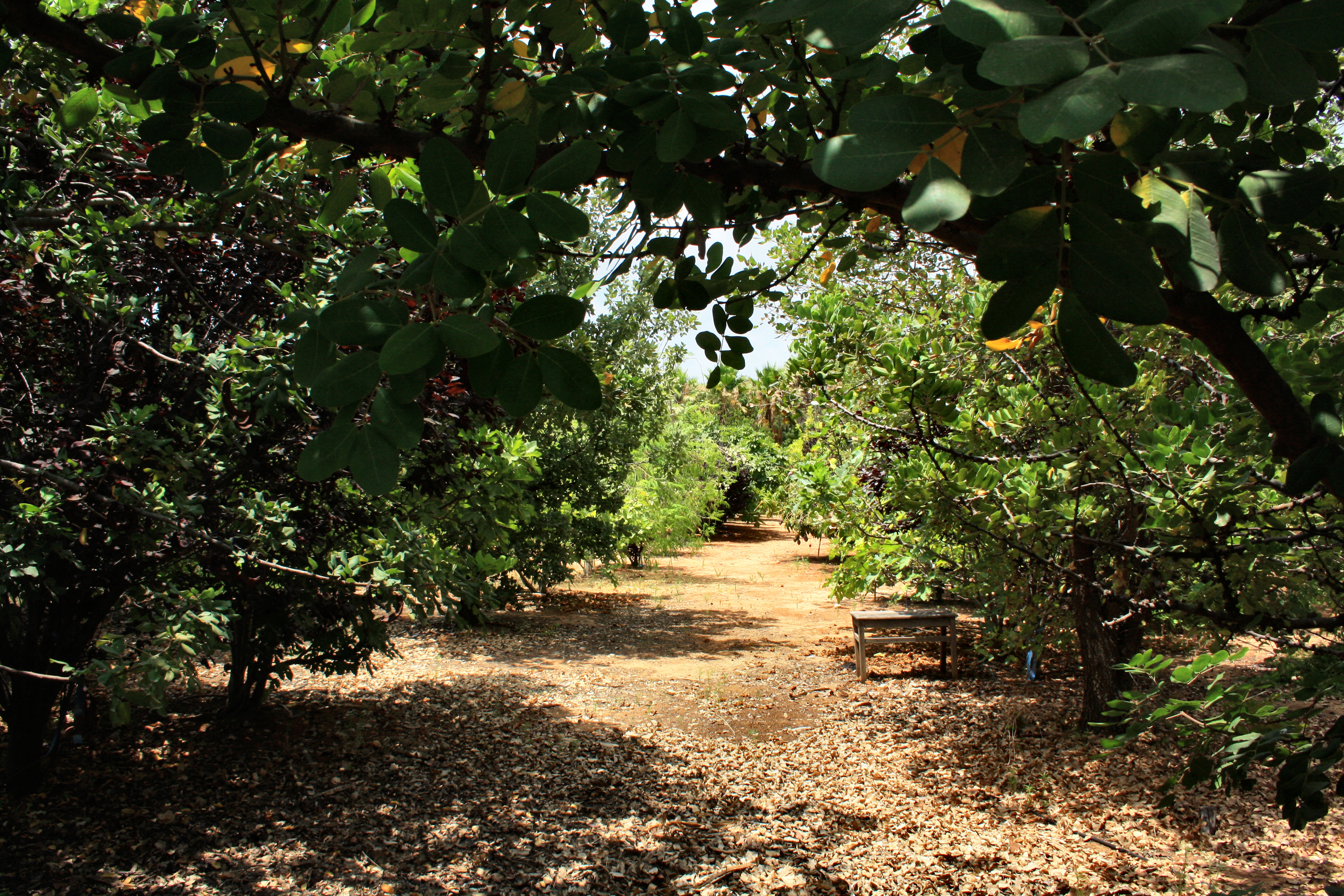 "חורשת בארי"/"חורשת הבנים" בחלקה החקלאית של בית הספר "בארי", רחוב גורדון, ראשון לציון.